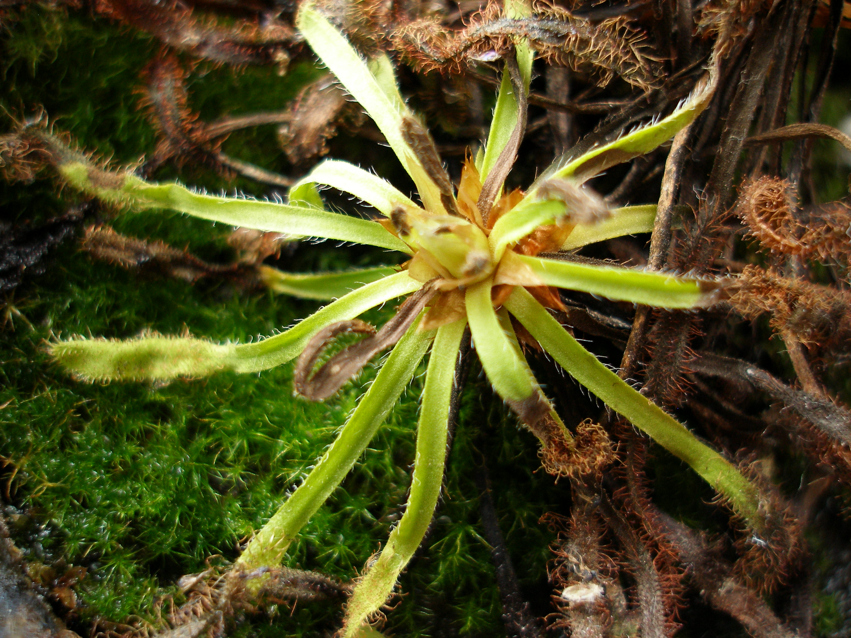 zdjecie rosiczki (Drosera capensis)